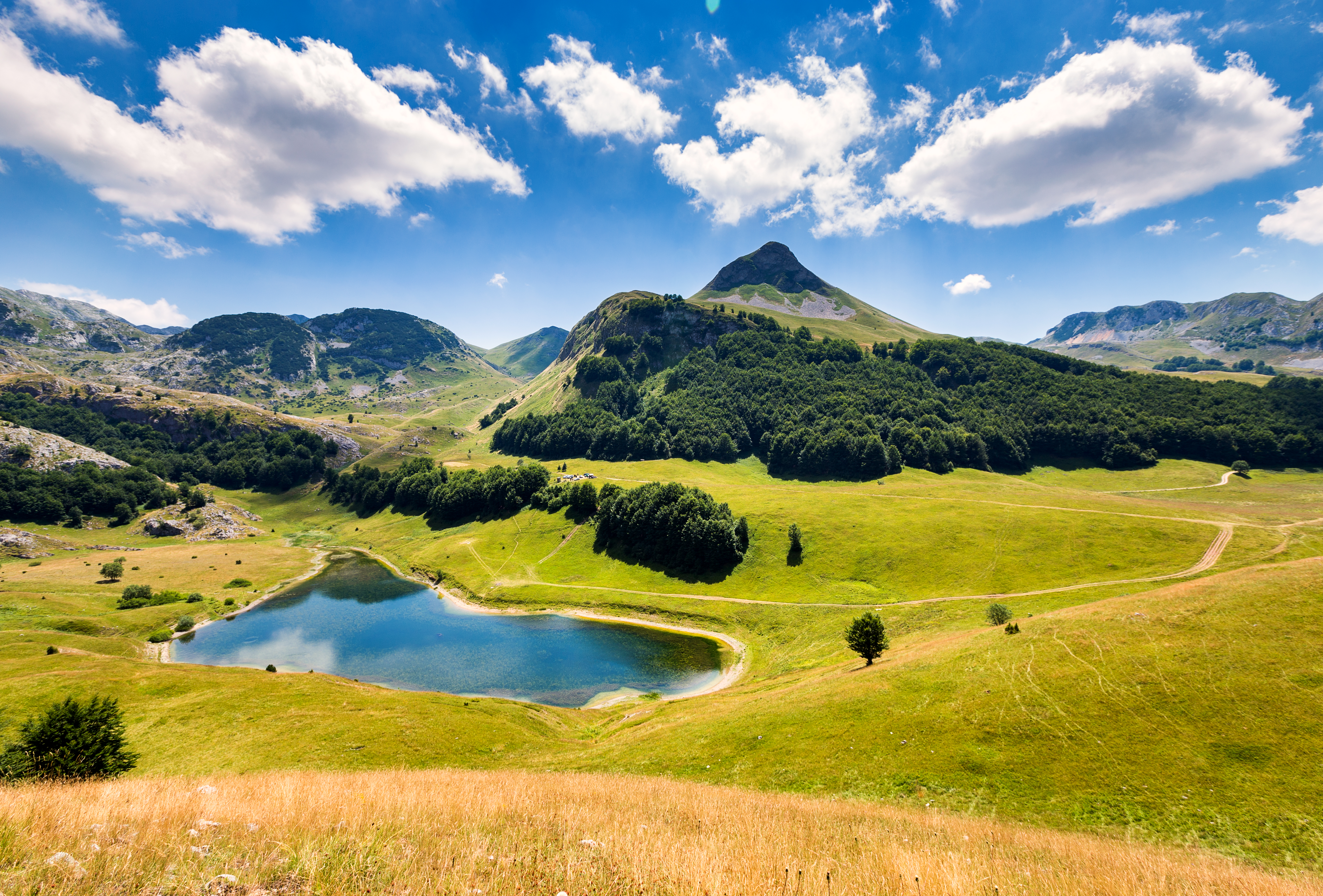 Orlovačko jezero i vrh Stog